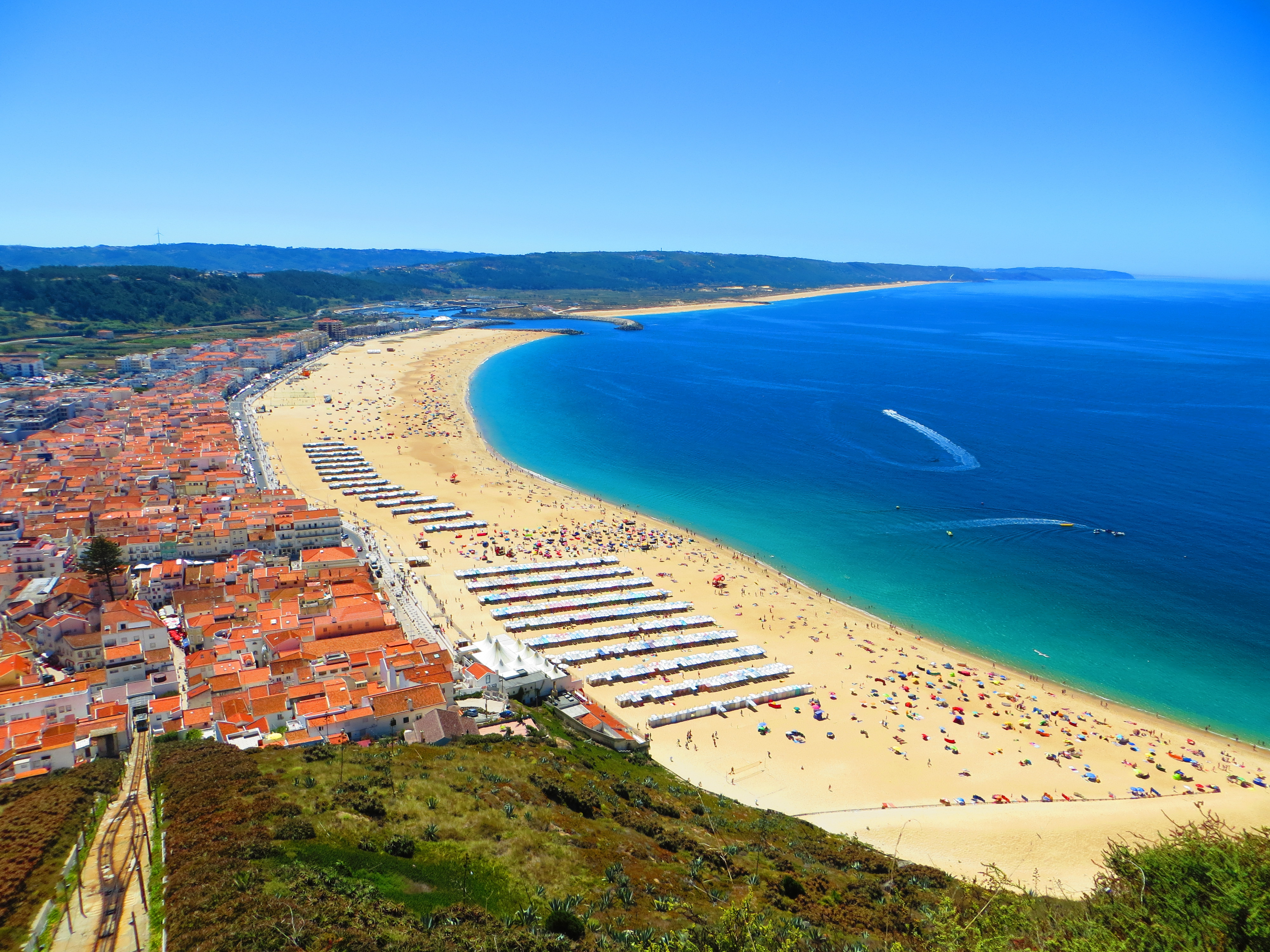 La grande plage de Nazaré